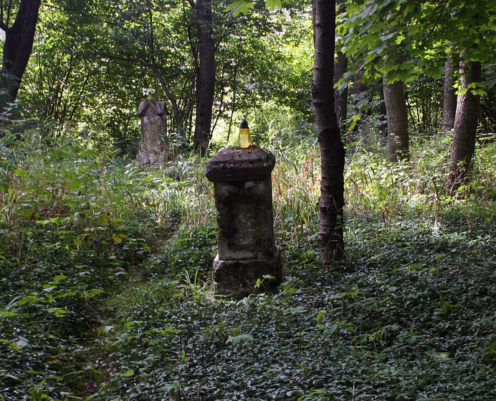 Pozostałości cmentarza w miejscowości Prełuki, gmina Komańcza, woj. podkarpackie